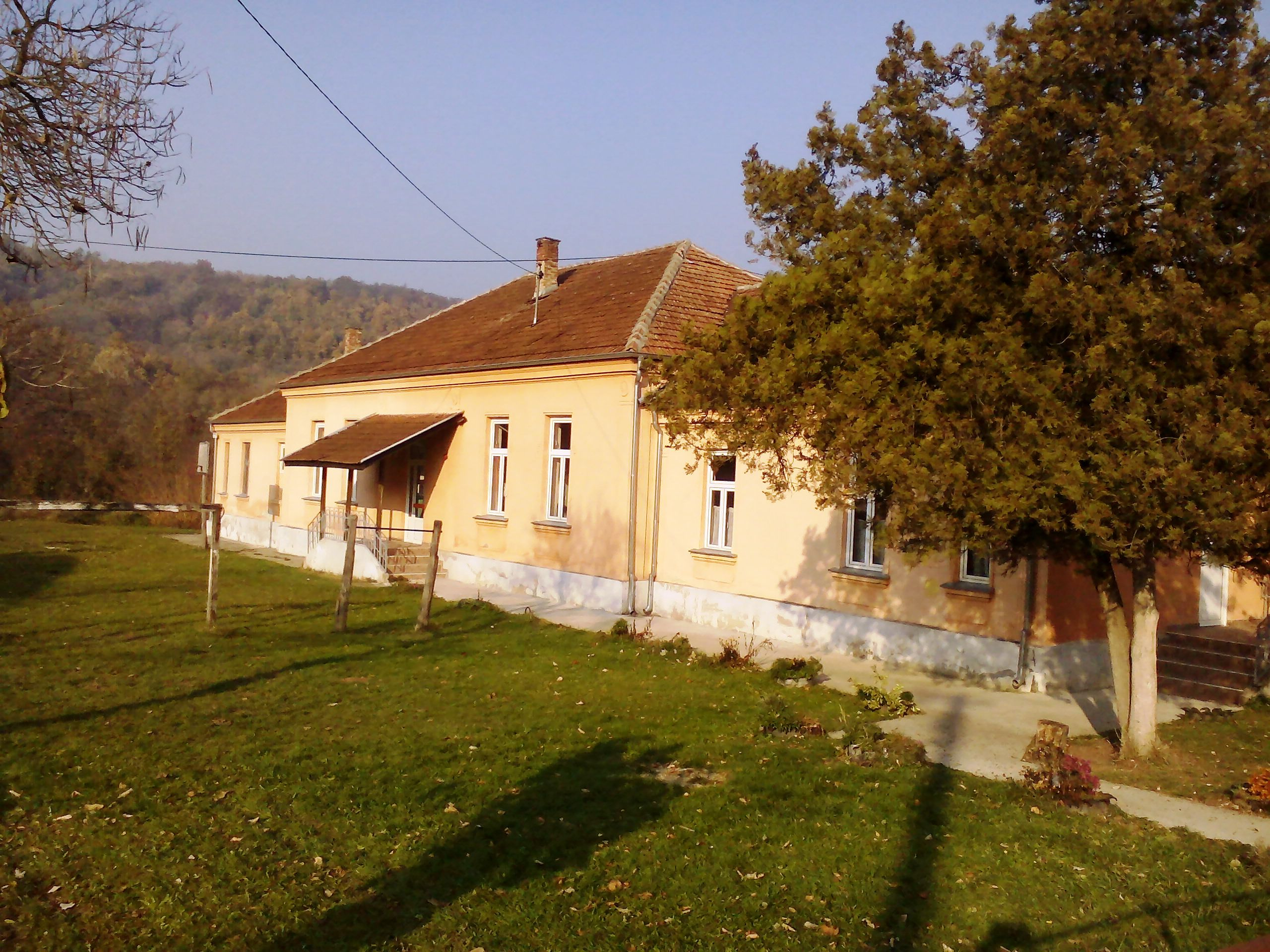 Поглед са улице